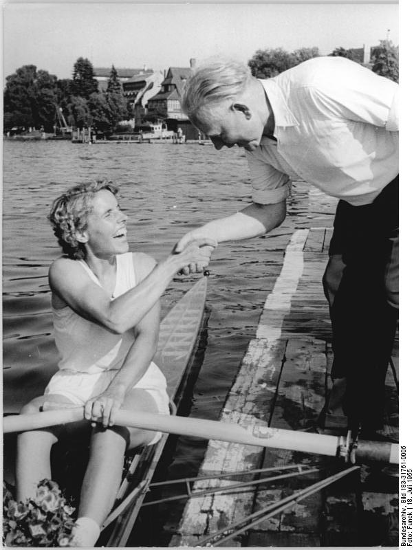 Marianne Horrmann, Heinz Dose Zentralbild Funck 18.7.1955 DDR-Rudermeisterschaften 1955 in Grünau Am 17. Juli 1955 fand auf dem Olympiakurs in Berlin-Grünau die DDR-Meisterschaft 1955 unserer Ruderinnen und Ruderer statt. In fast allen Kämpfen gab es packende Positionskämpfe. UBz: Der Präsident der Sektion Rudern, Heinz Dose, beglückwünscht die neue DDR-Meisterin im Einer der Frauen, Marianne Horrmann (SC Motor Berlin).